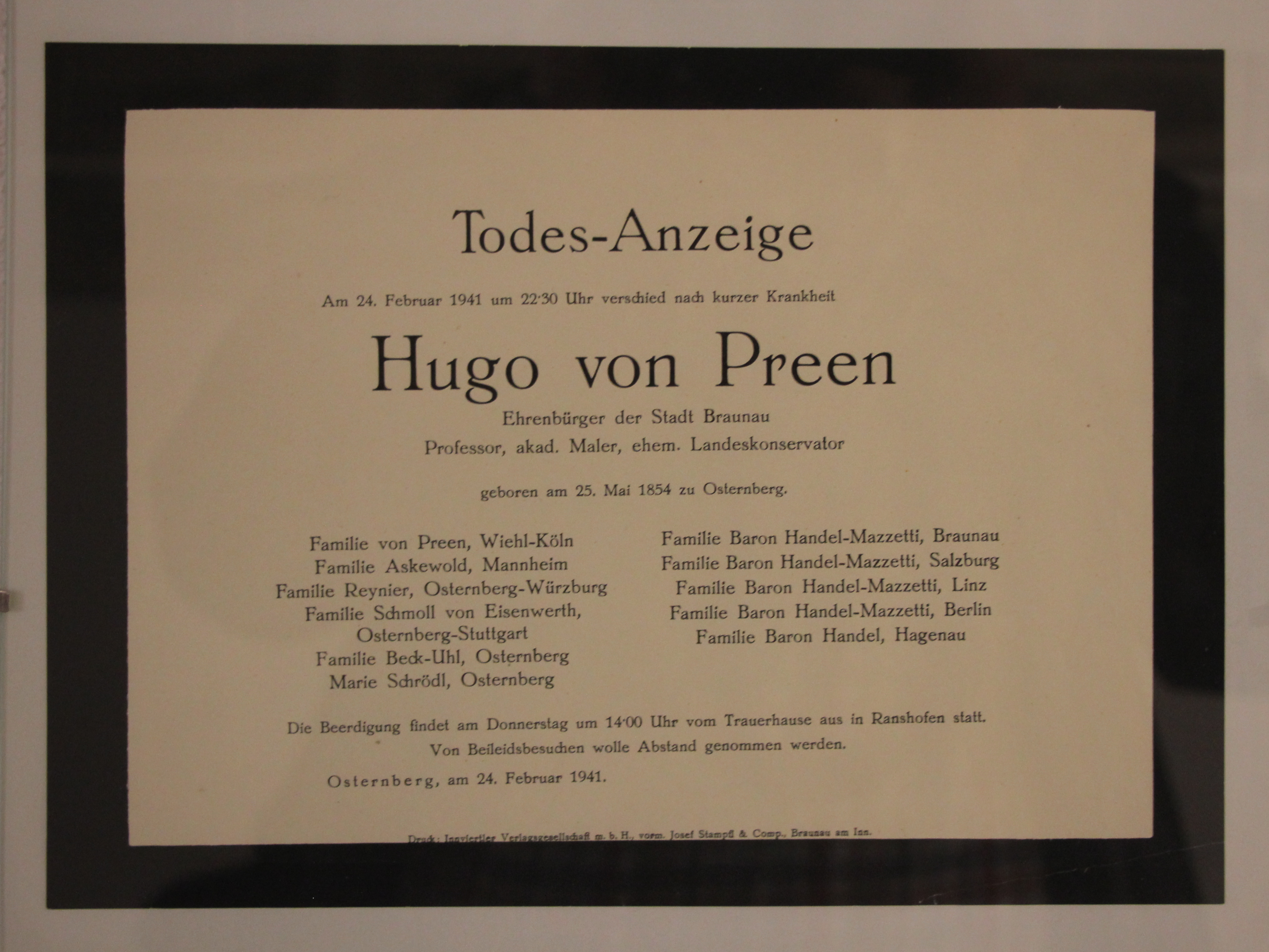 Heimathaus mit Glockengießerei in Braunau am Inn